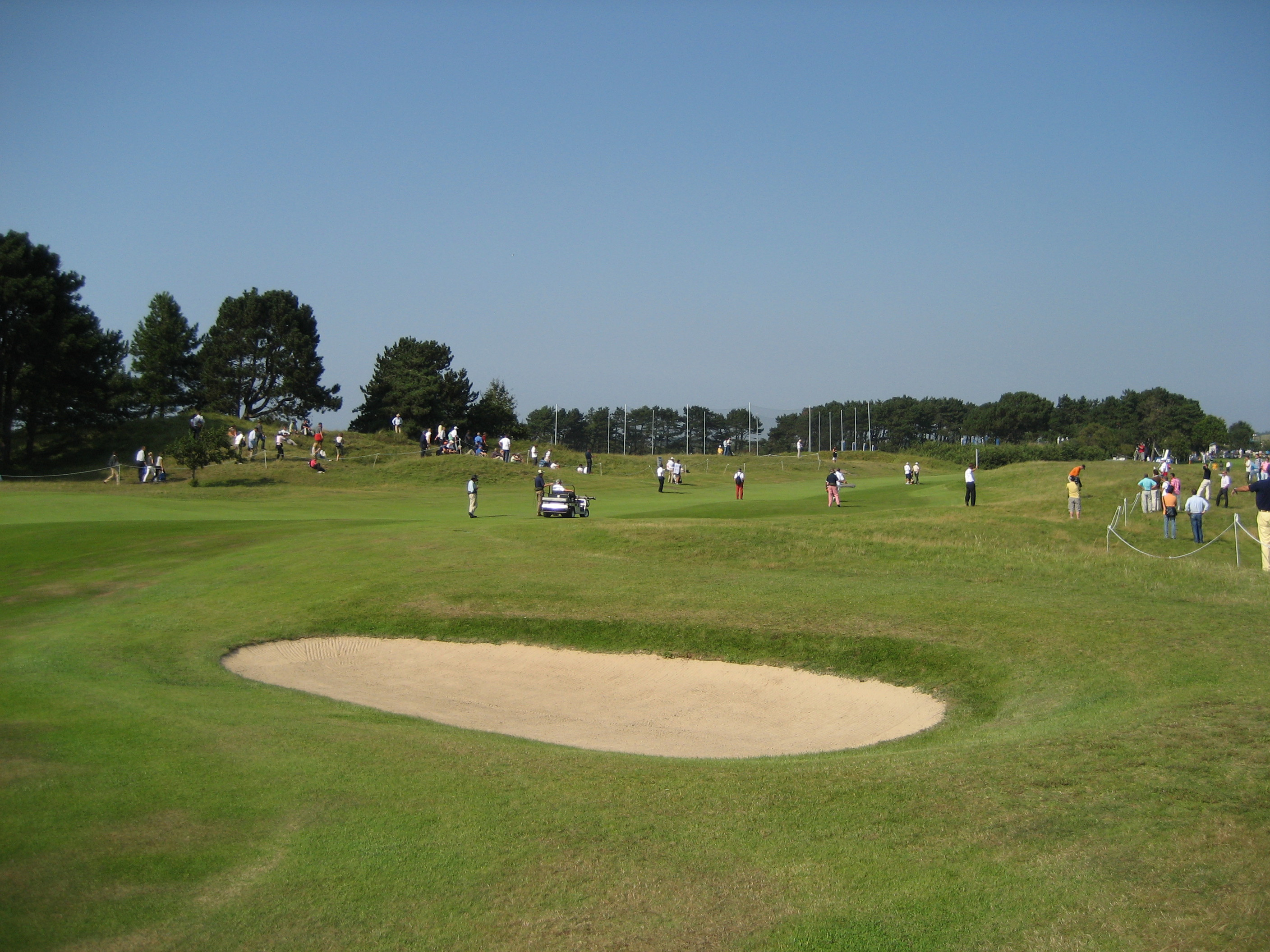 Kennemer Golf & Country Club (KLM Open)